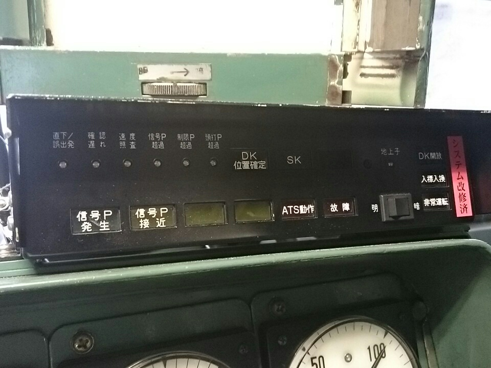 415系Fo124編成(クハ411-224)に搭載されたATS-DKのコンソール。※2016年度大分車両センター一般公開での「運転台公開」において撮影